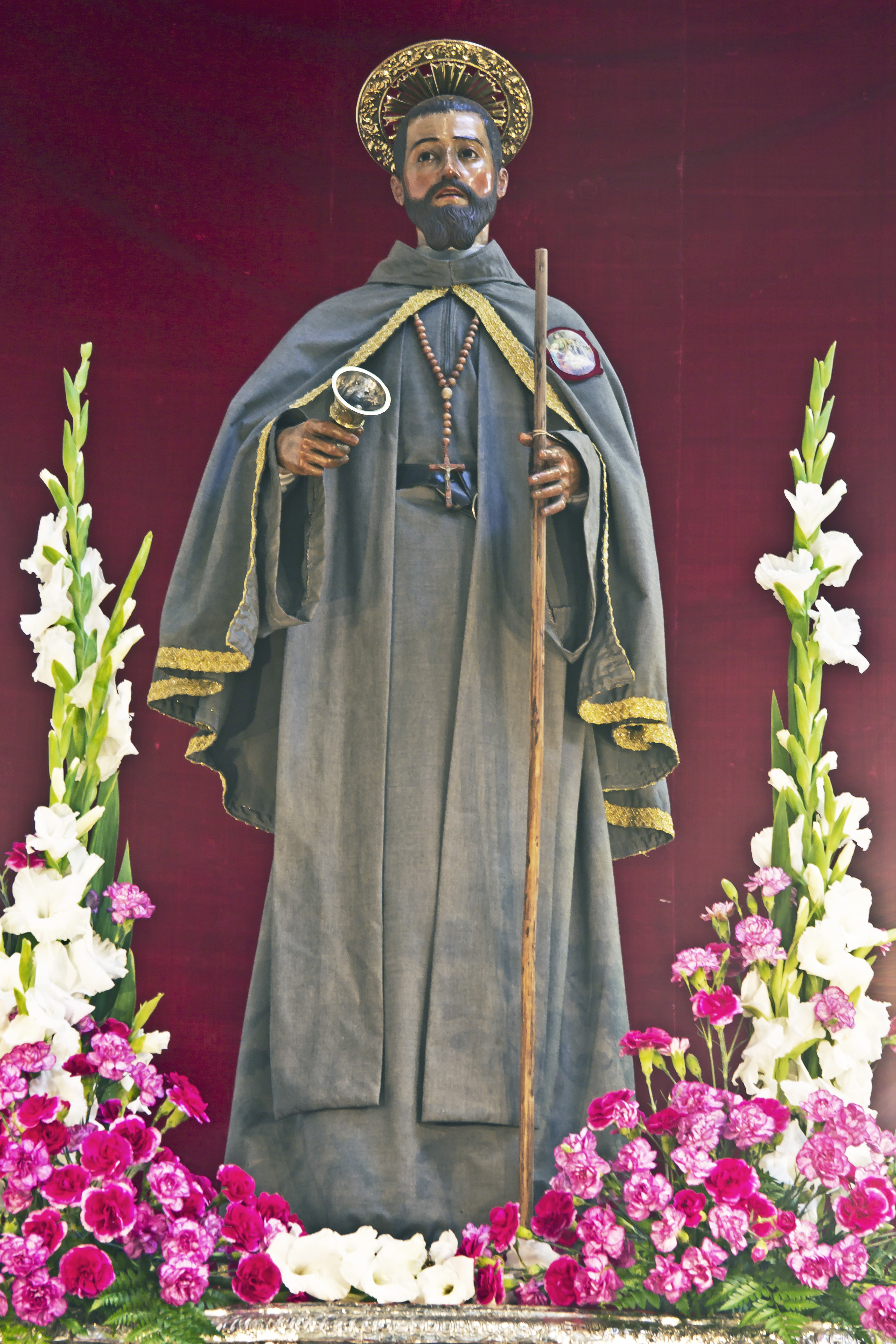 Santo Hermano Pedro en la Catedral de La Laguna